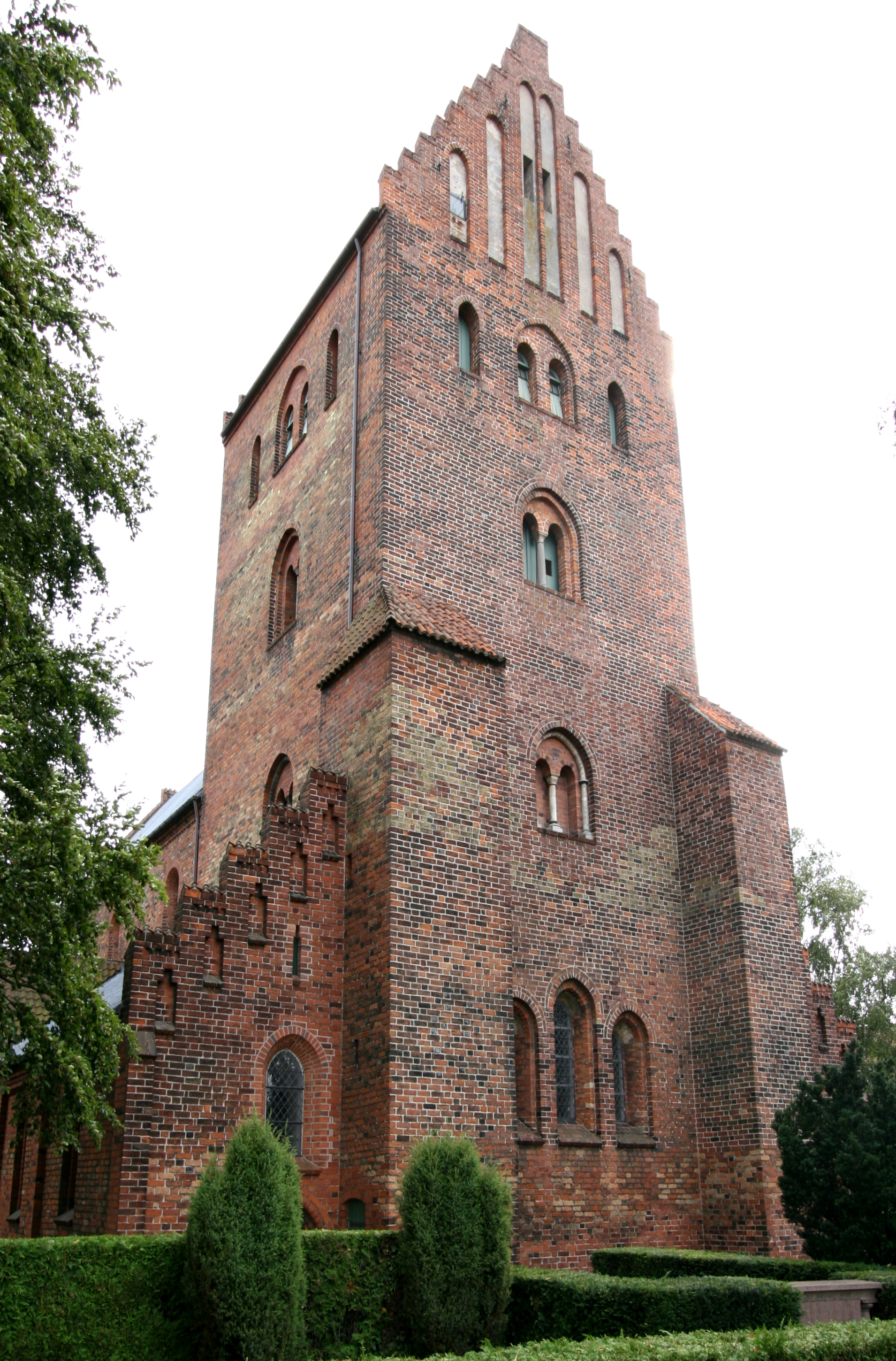 Gammel Vor Frue Kirke in Roskilde, Denmark. Belfry.